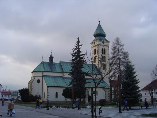 Kostol na námestí sv. Mikuláša Obrázok odfotil Kristián Slimák. This medium shows the protected monument with the number 505-334/0 in the Slovak Republic. Kategória:Obrázky budov Kategória:Presunúť na Commons